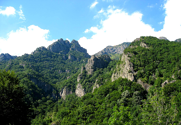 Vedere asuprea munţilor Cozia din poiana Stânişoara